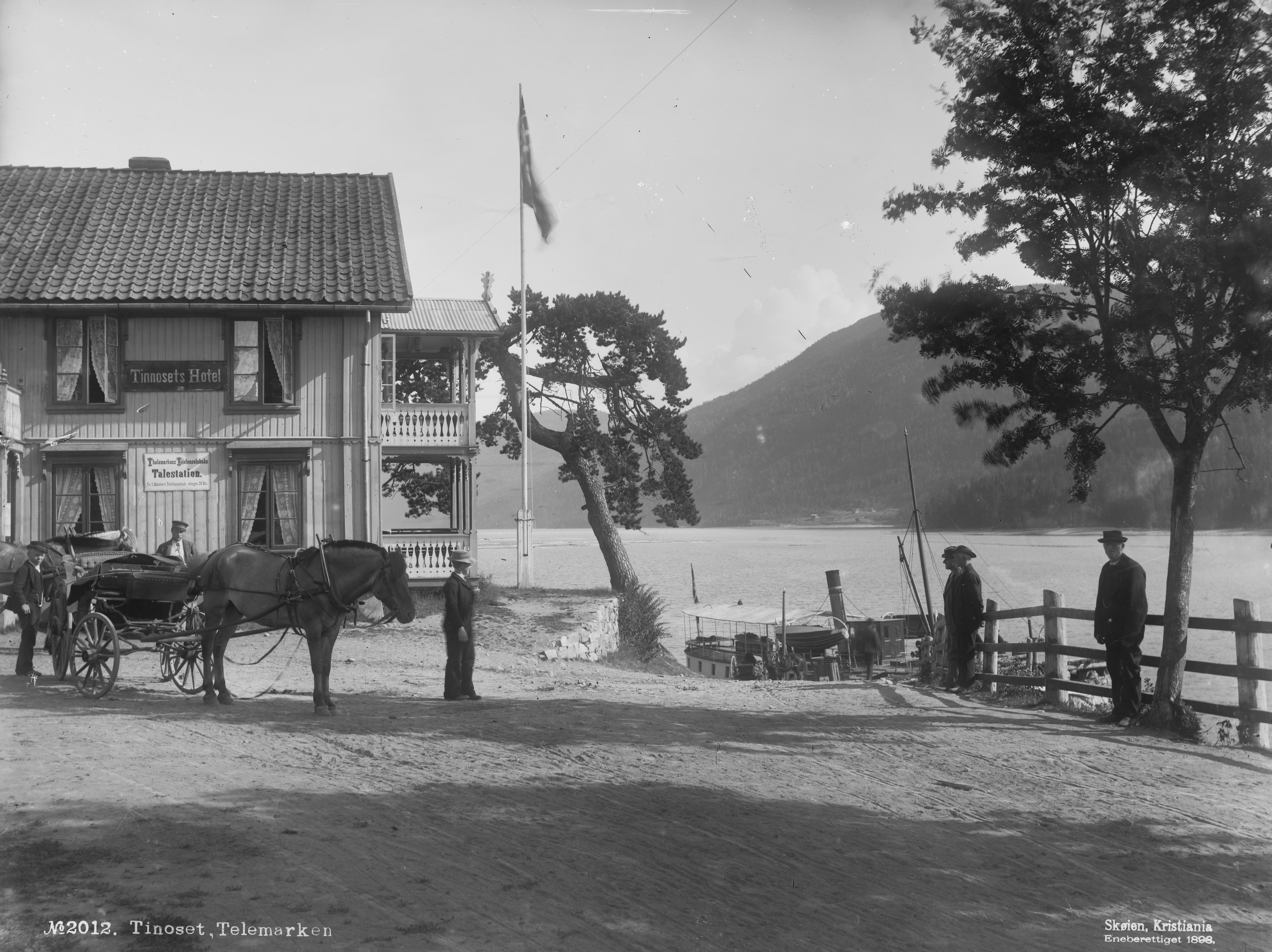 Påskrift negativ: No2012. Tinnoset, Telemarken Skøien. Kristiania Eneberettiget 1898 Påskrift negativ: 169 Tinnoset [Riksantikvaren] Påskrift konvolutt: B-169 Gransherrad Tinnoset hotel [Riksantikvaren] [Negativet er eksponert med speilvendt resultat. Rettet opp.] Sted: Gransherad,Tinnoset Kommune: Notodden Fylke: Telemark Tagger: Tinnosets Hotel hotell hest og vogn vann menn dampbåt